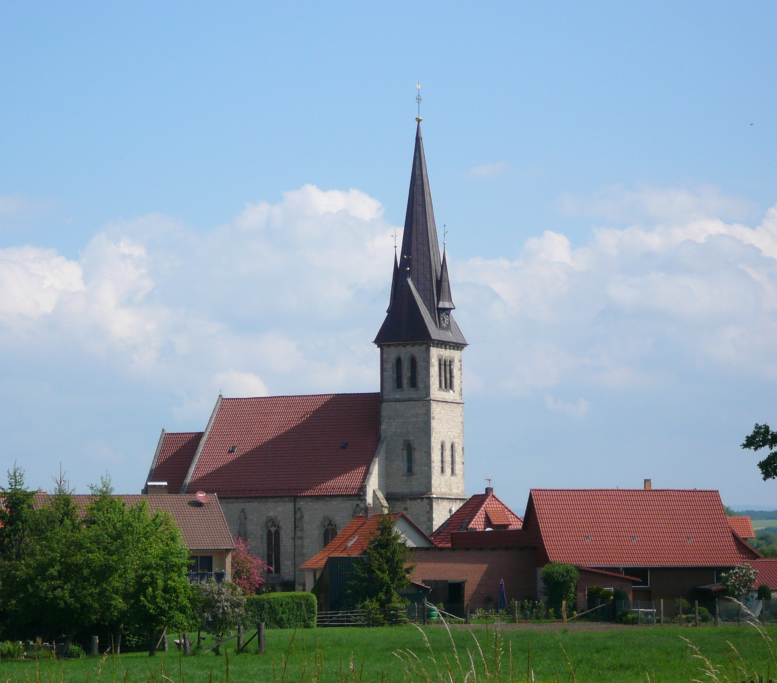 Blick auf Westerode, Duderstadt, mit der katholischen Pfarrkirche St. Johannes Baptist